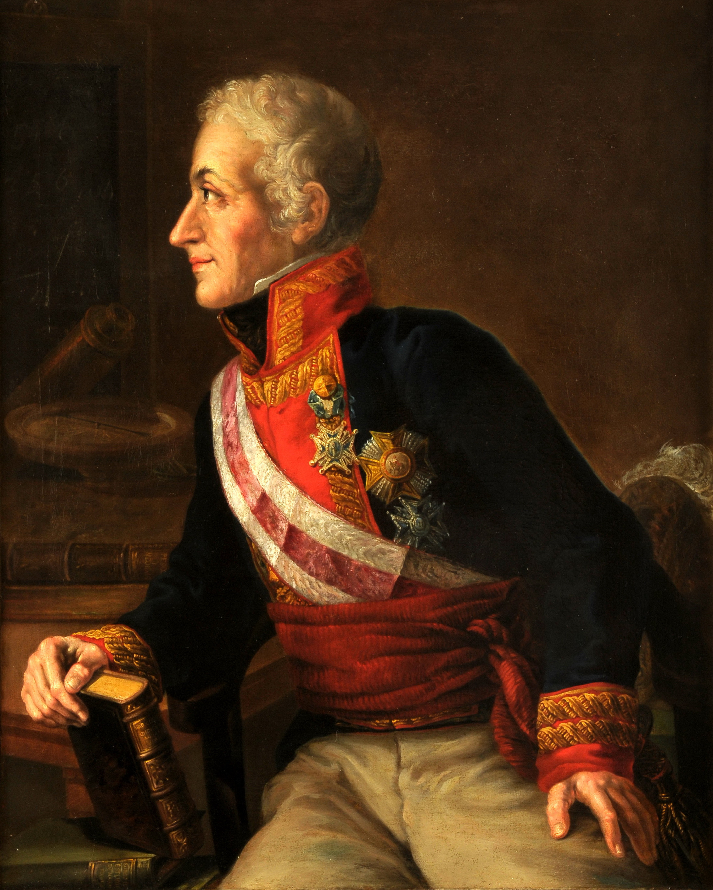 Retrato del marino y politico español Gabriel Císcar y Císcar (1769-1829), que llegó a ser un destacado matemático y también teniente general de la Real Armada Española y ministro de Marina en 1810. El cuadro se conserva en el Museo Naval de Madrid.